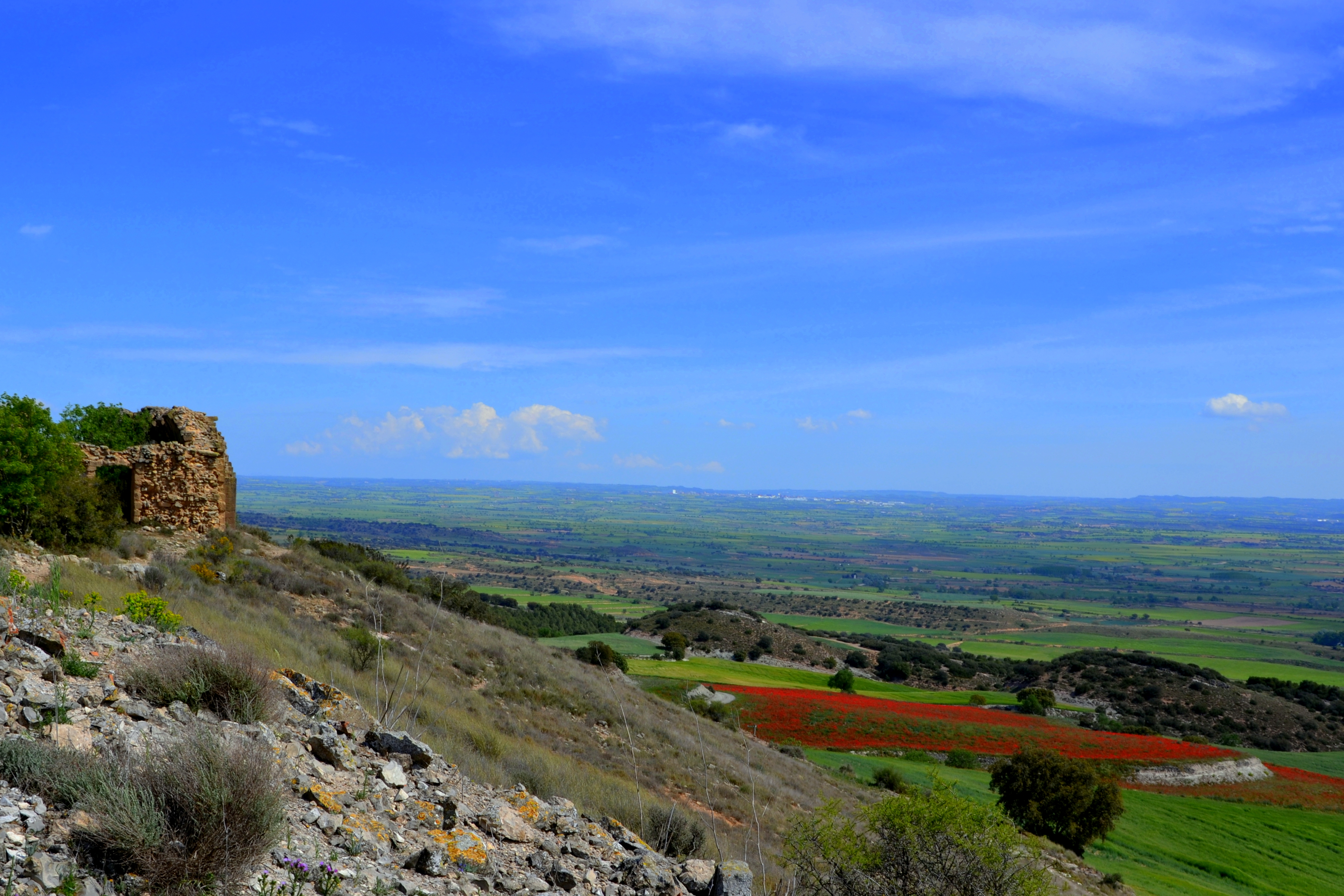 Bellmunt-Almenara This is a a photo of a natural area in Catalonia, Spain, with id: ES510177